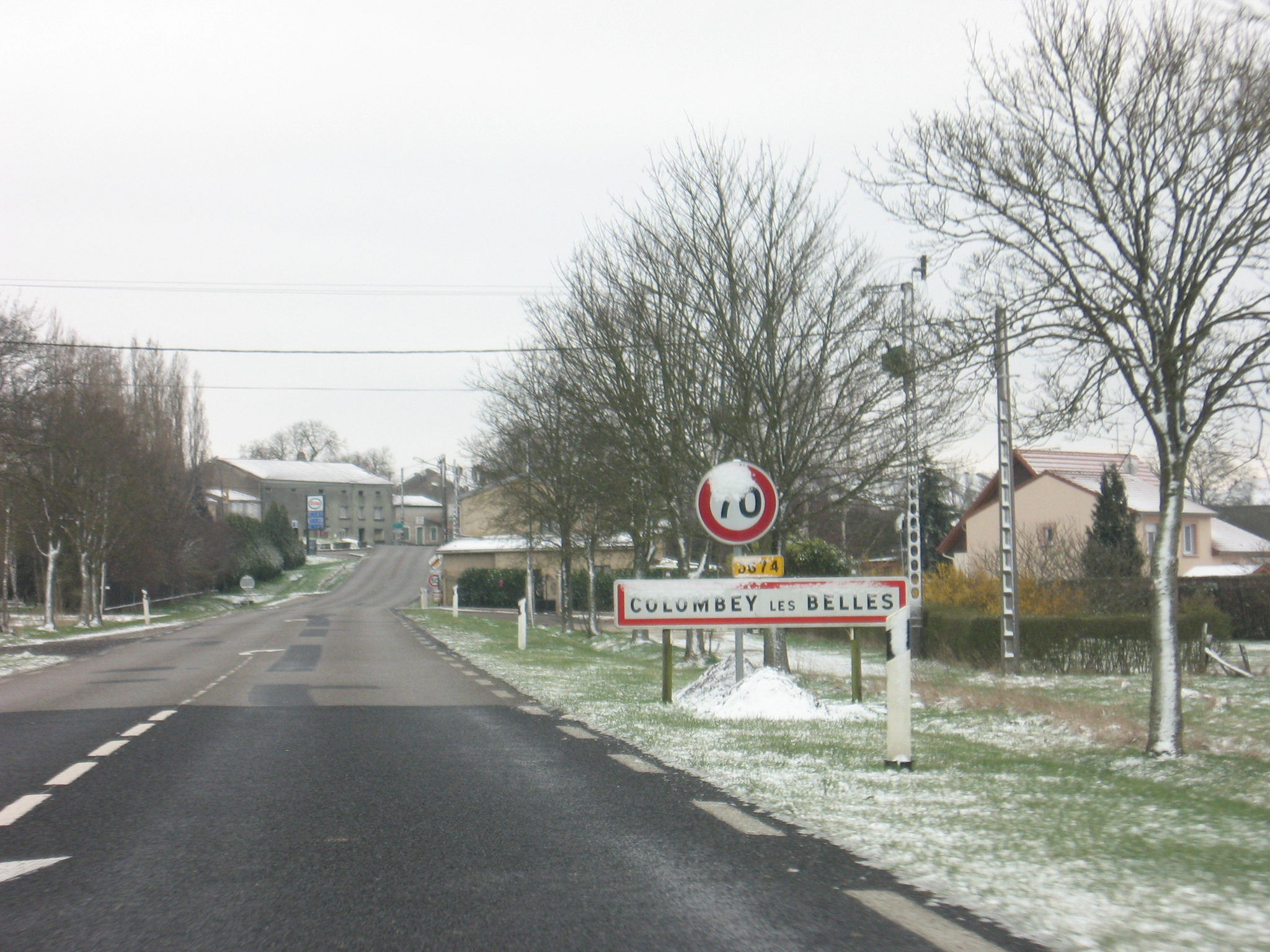 Colombey-les-Belles, Meurthe-et-Moselle